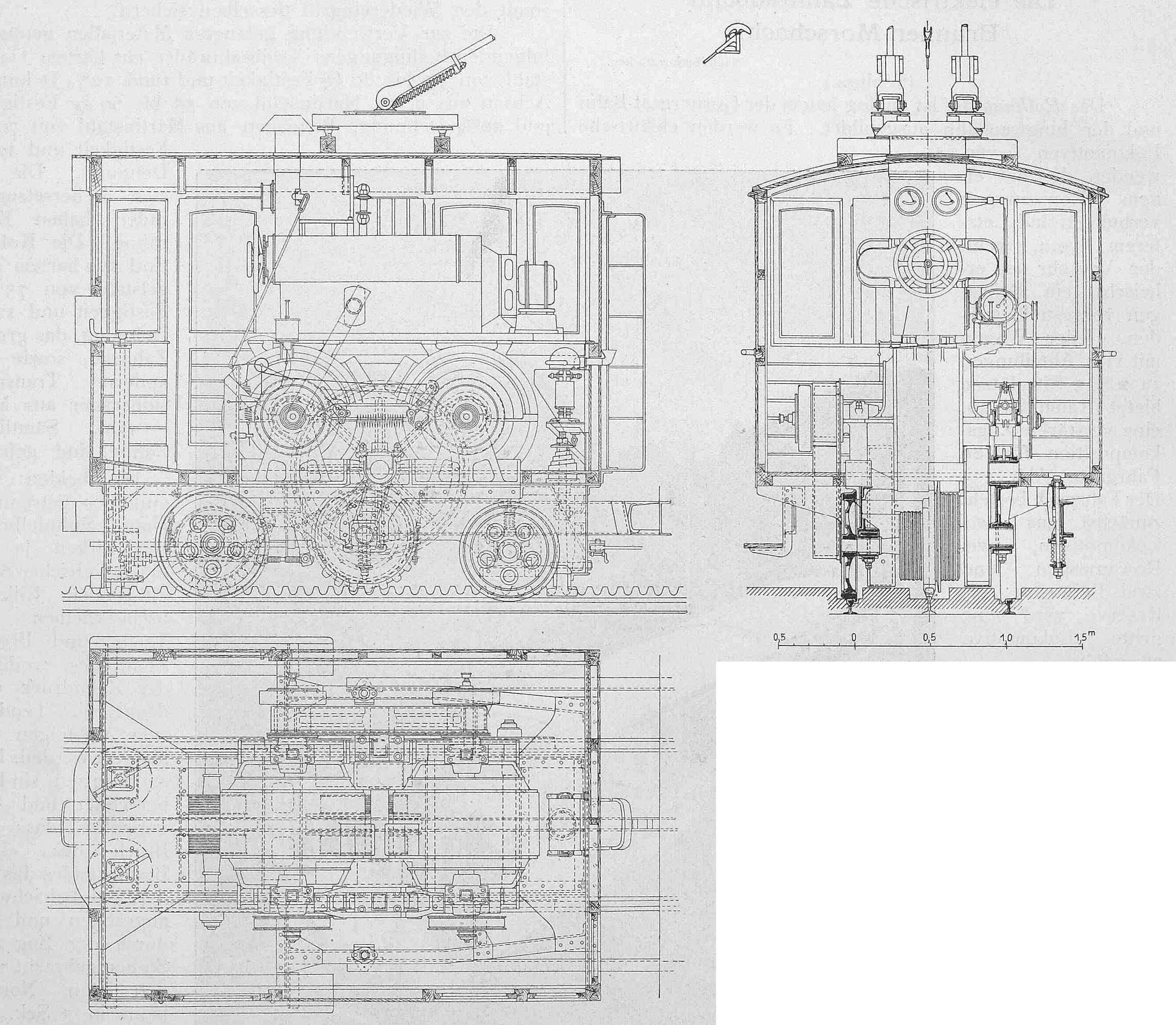 Zeichnung der Lokomotiven der Morschach–Axenstein-Bahn